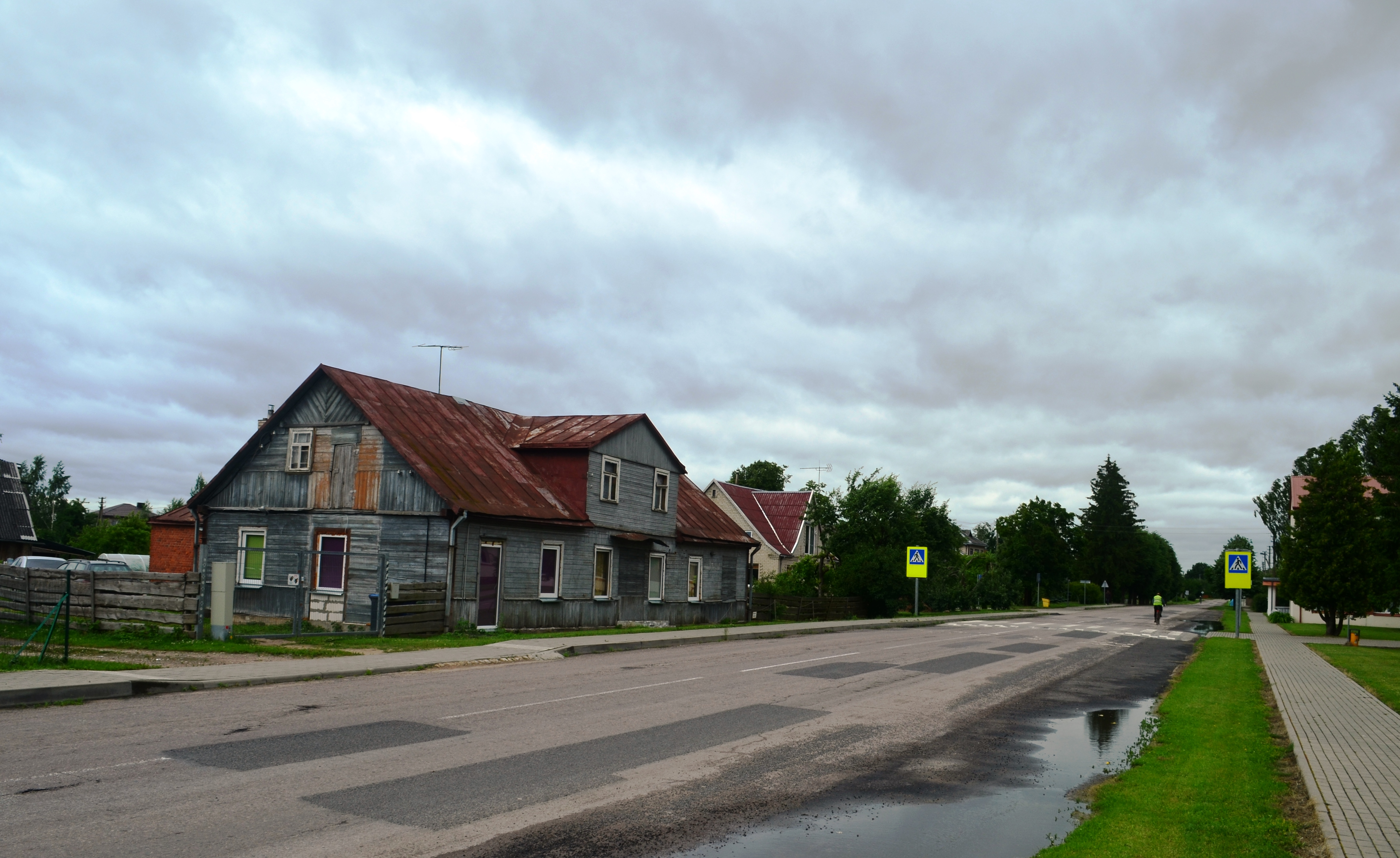 Sūduvos gatvė, Sasnava, Marijampolės sav.